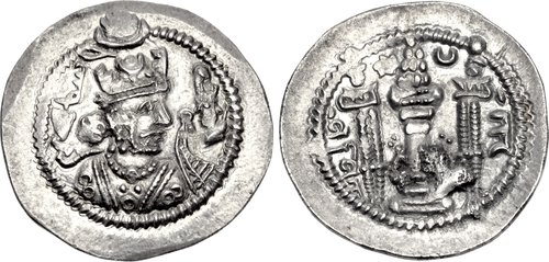 Coin of Jamasp. 497-499 , Sasanian king